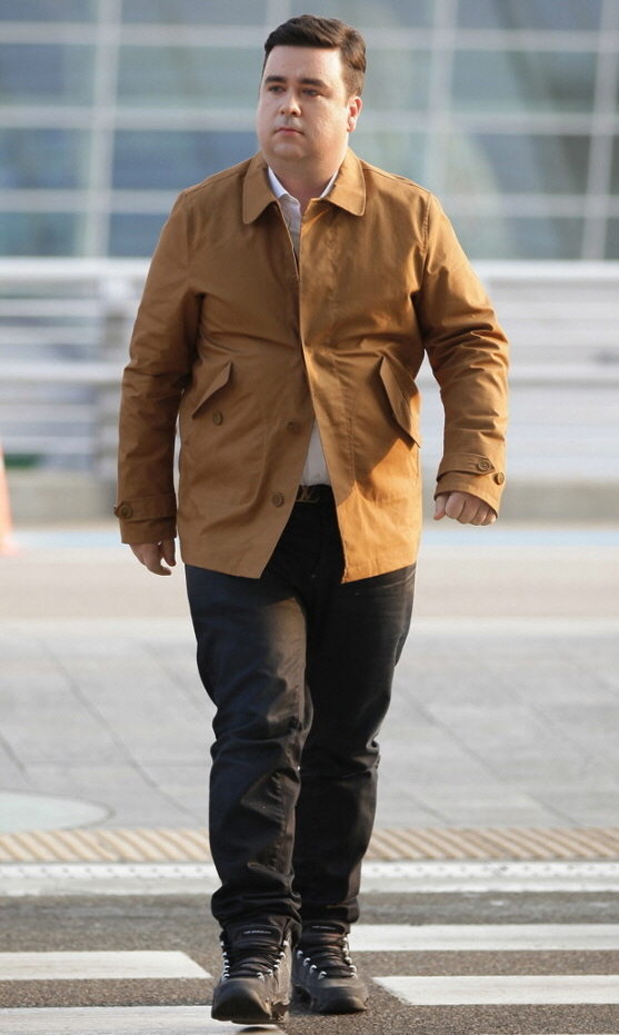 2015 한류패션페스티벌 (Korean Wave Fashion Festival) 포토존 기념행사